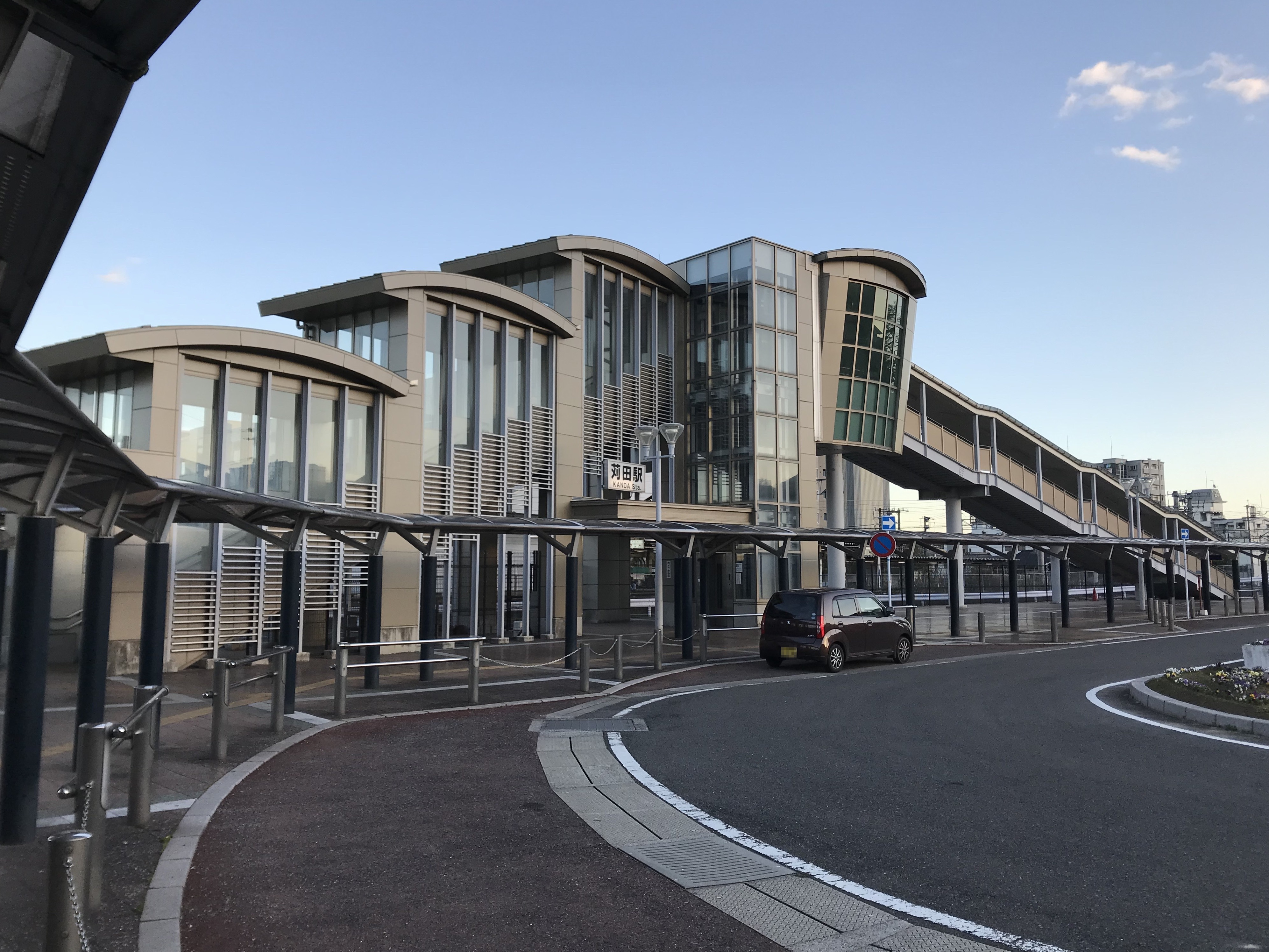 苅田駅の西口駅舎